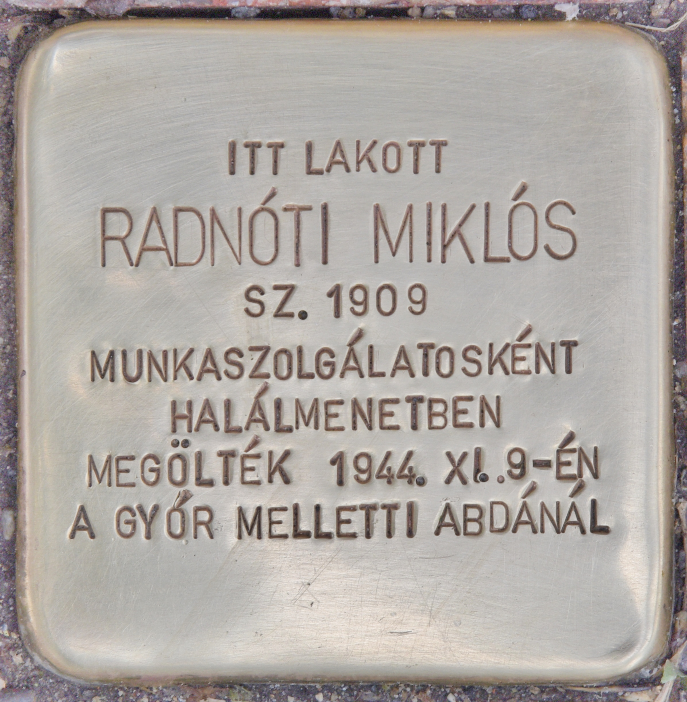 Stolperstein für Miklos Radnoti - Radnoti Miklos